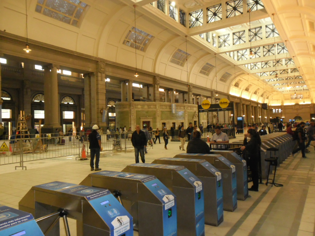 Retiro. Molinetes de acceso